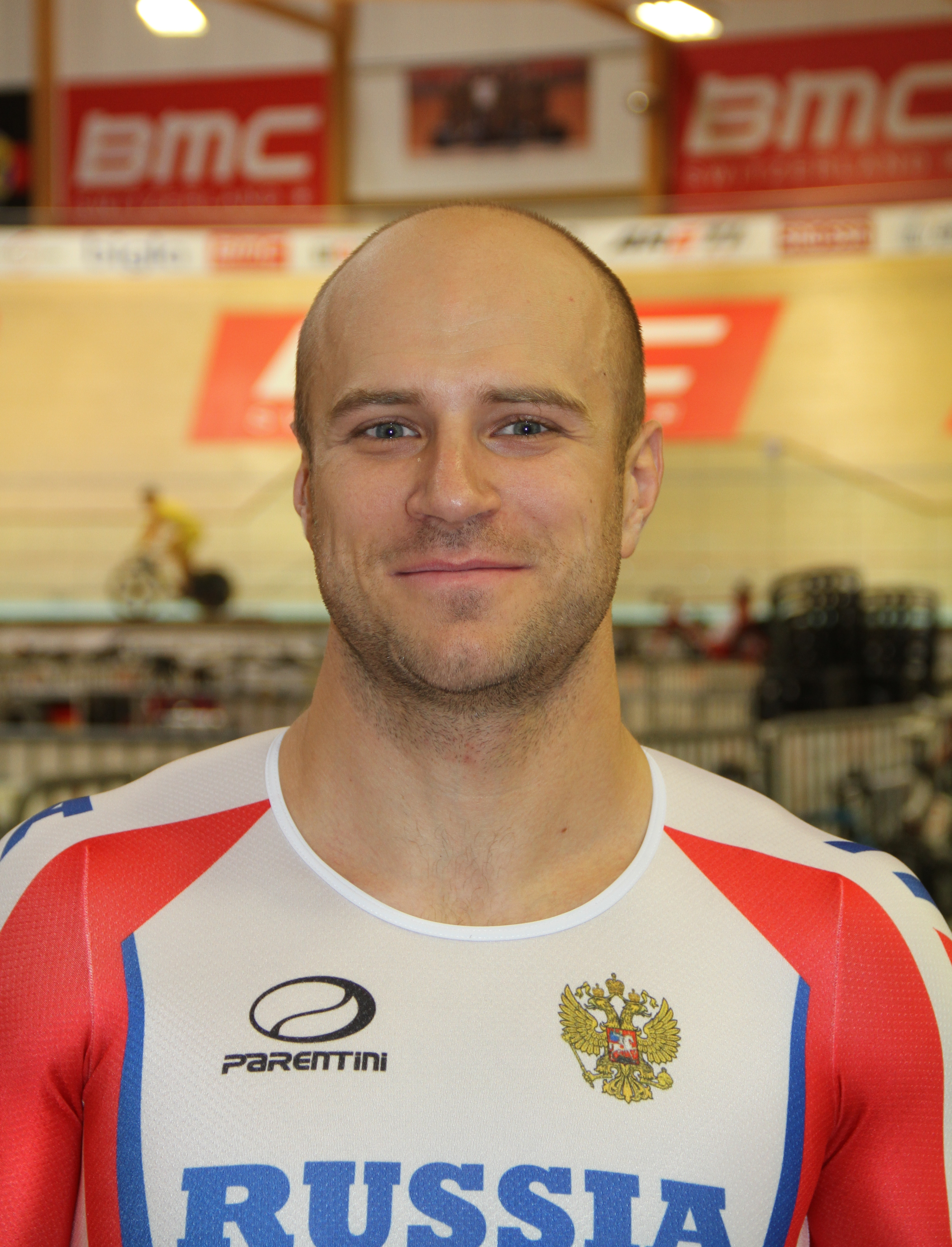 Denis Dmitriev, russischer Radsportler The making of this document was supported by the Community-Budget of Wikimedia Germany.